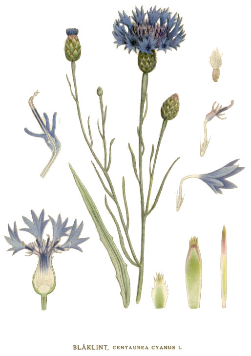 Blåklint (Centaurea cyanus)